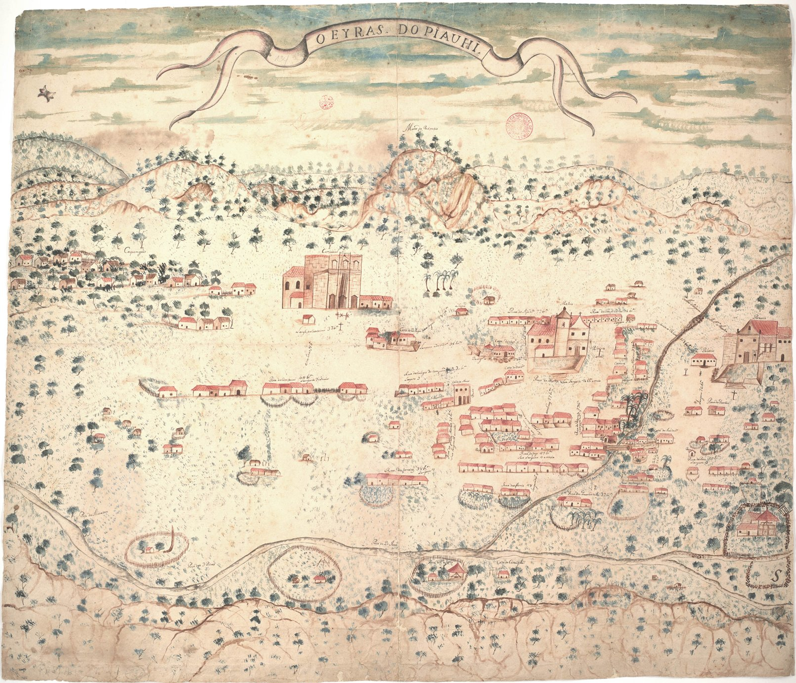 Oeyras_do_Piauhí em 1758